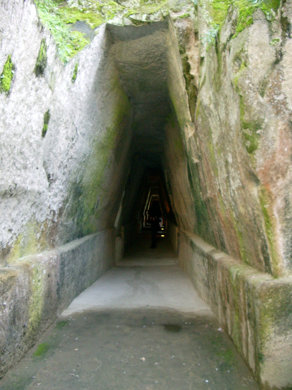 Antre de la Sybille